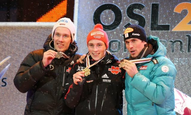 Tino Edelmann, Eric Frenzel i Felix Gottwald podczas ceremonii medalowej po konkursie indywidualnym (Gundersen - skok na obiekcie HS106 + bieg na 10 kilometrów) w ramach Mistrzostw Świata w Narciarstwie Klasycznym 2011 w Oslo.